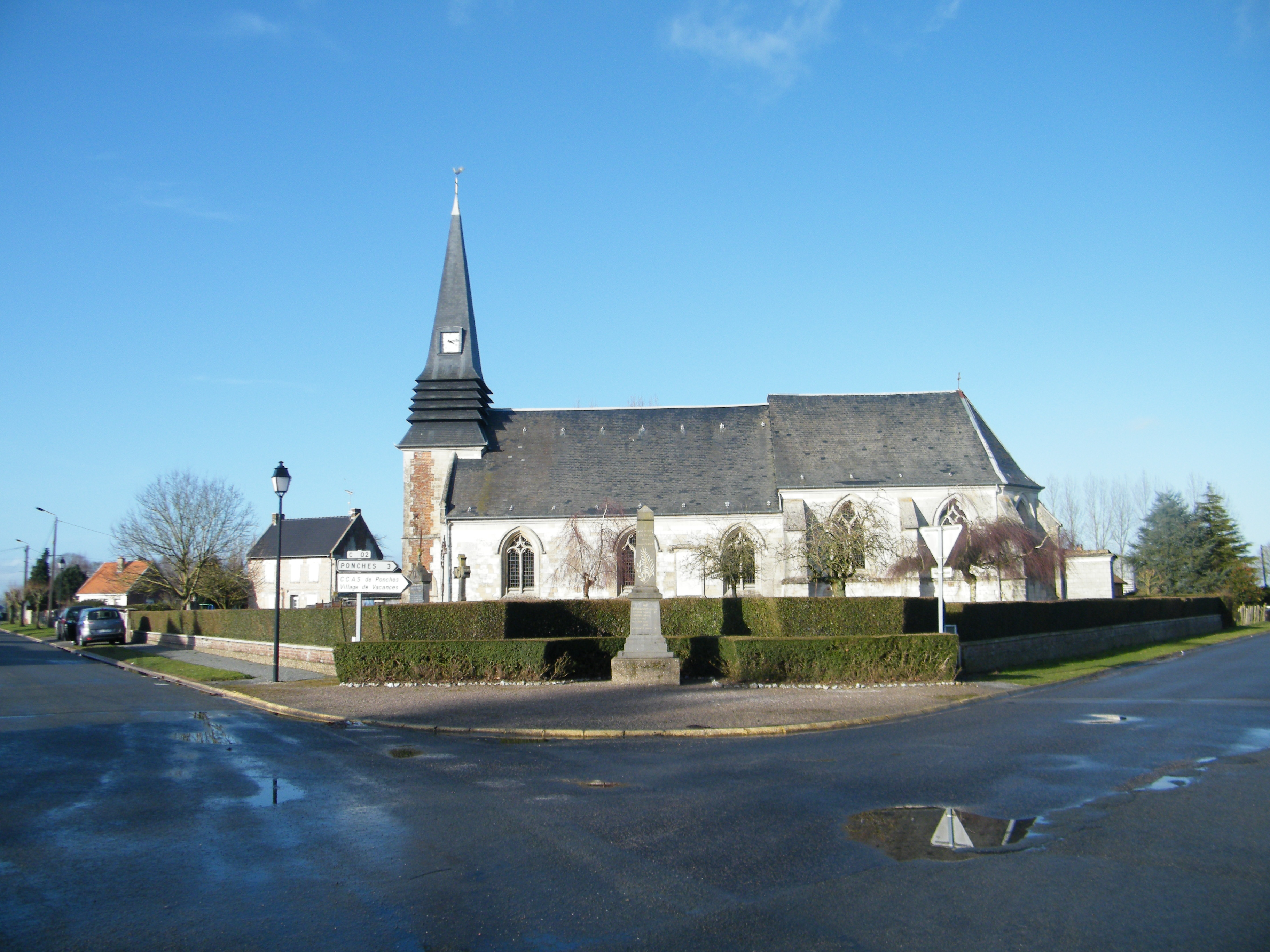 L'église Notre-Dame-de-l'Assomption de Ligescourt, Somme, France.